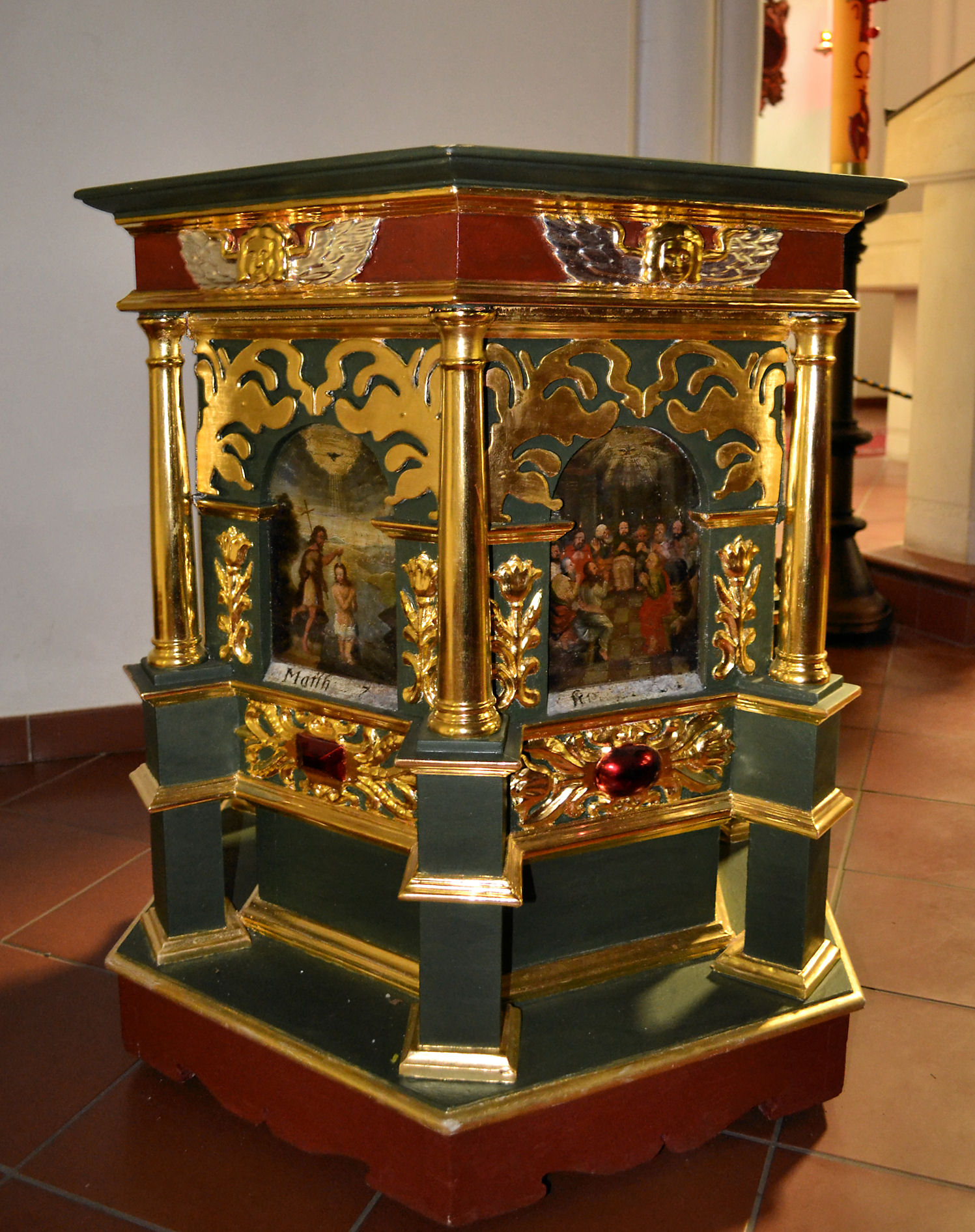 Neogotycki kościół Miłosierdzia Bożego w Trzęsaczu